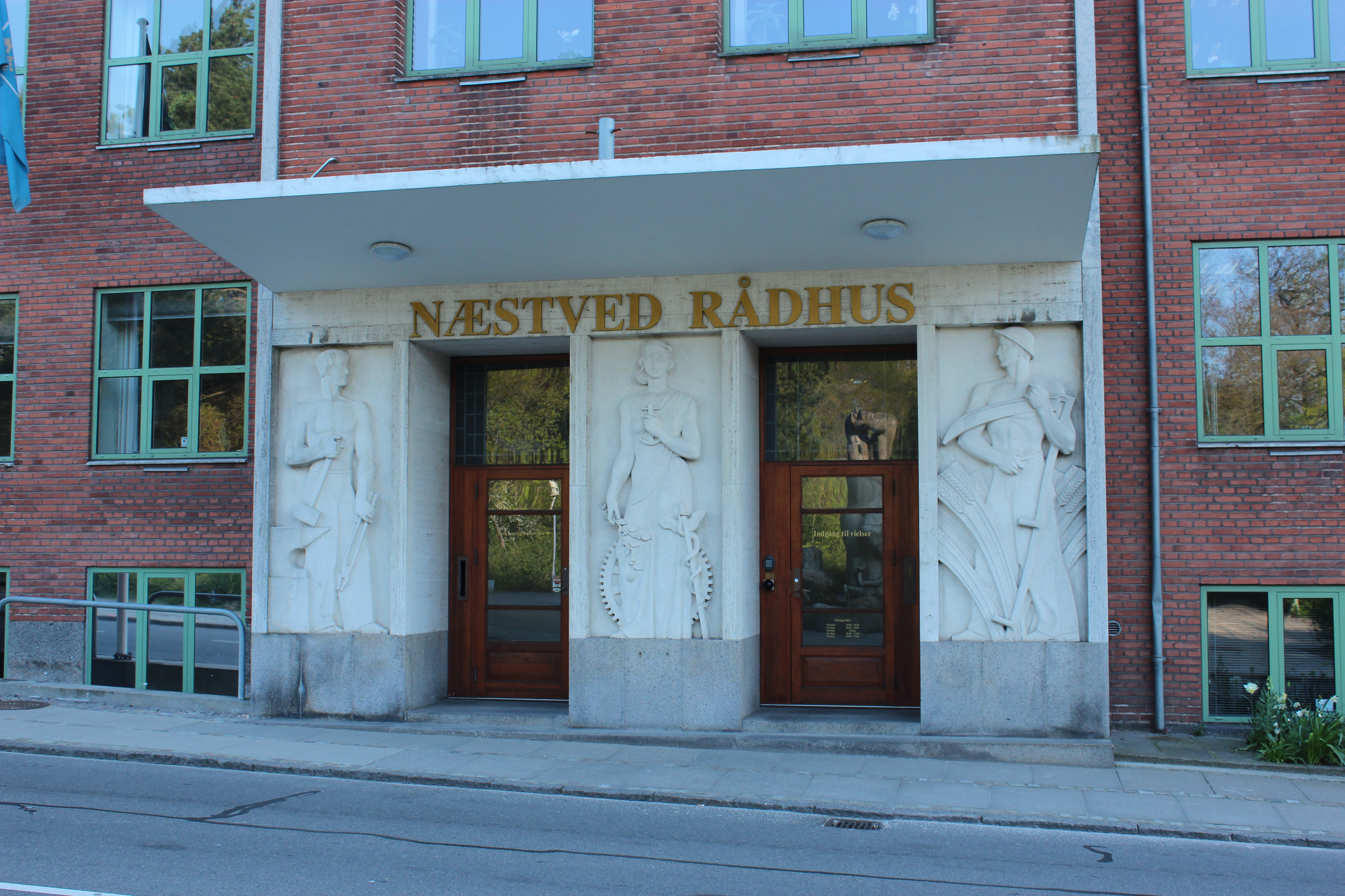 Indgangspartiet til Næstved Rådhus, Teatergade 8.